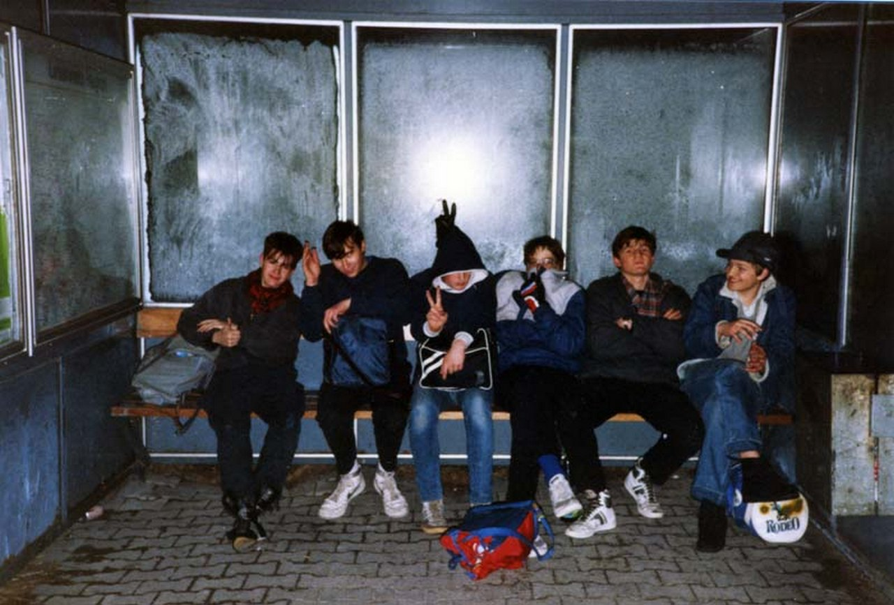 Der Morgen danach, Loomit, Roscoe, Roy, Zip, Blash und Don M. Zaza nach dem Besprühen des Geltendorfer Zuges am S-Bahnhof Türkenfeld.